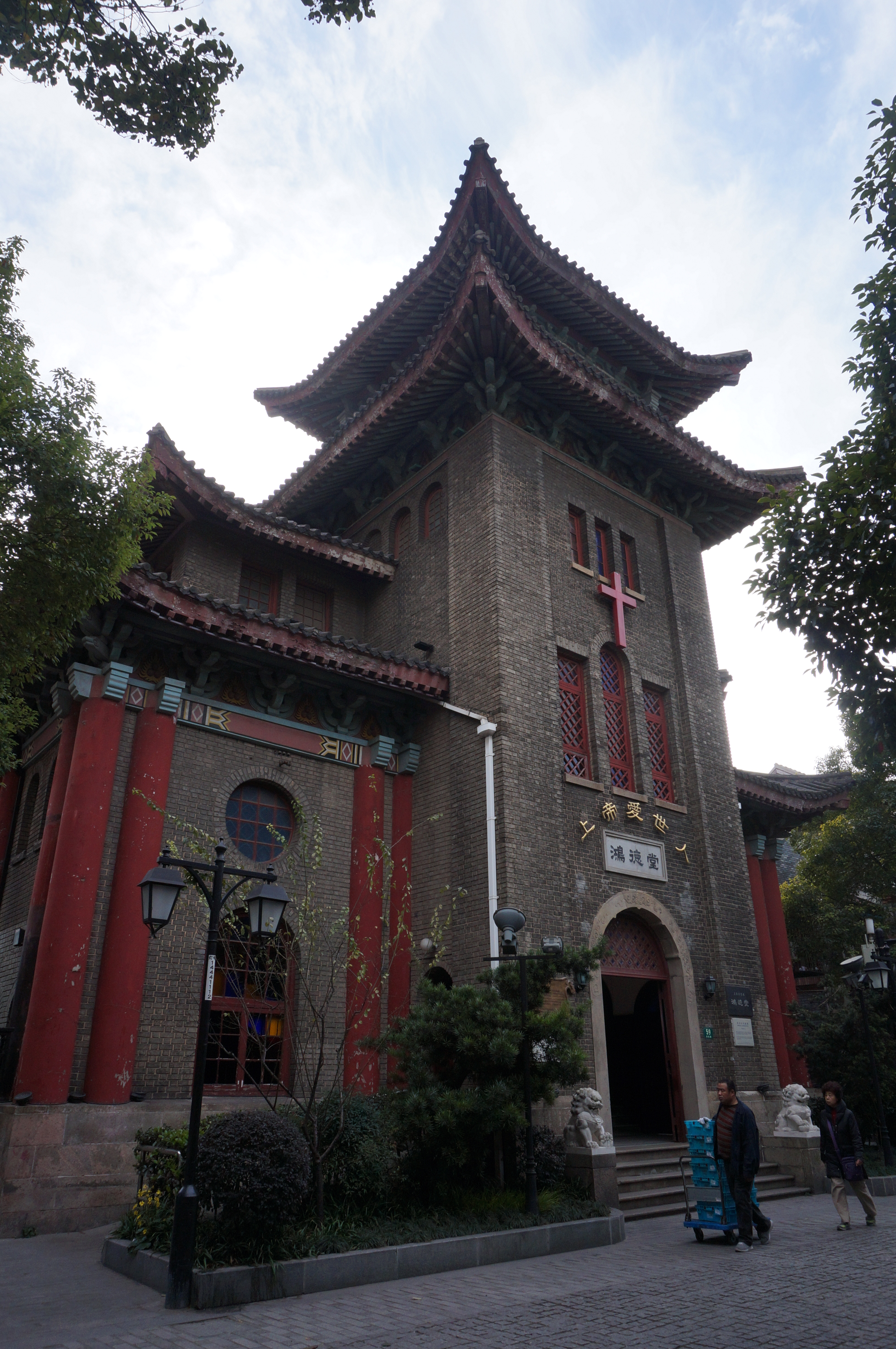 上海鸿德堂